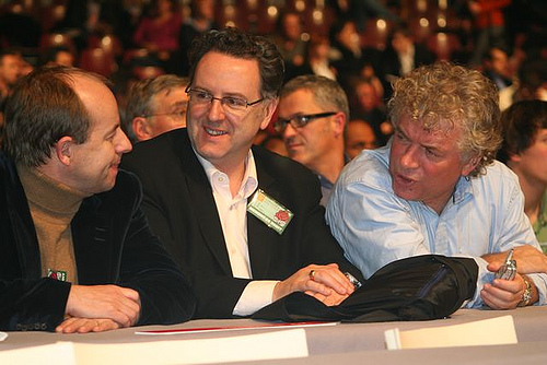 Jean-Jacques Urvoas, député du Finistère, Richard Ferrand et François Cuillandre, maire de Brest, au Congrès de Reims du PS.